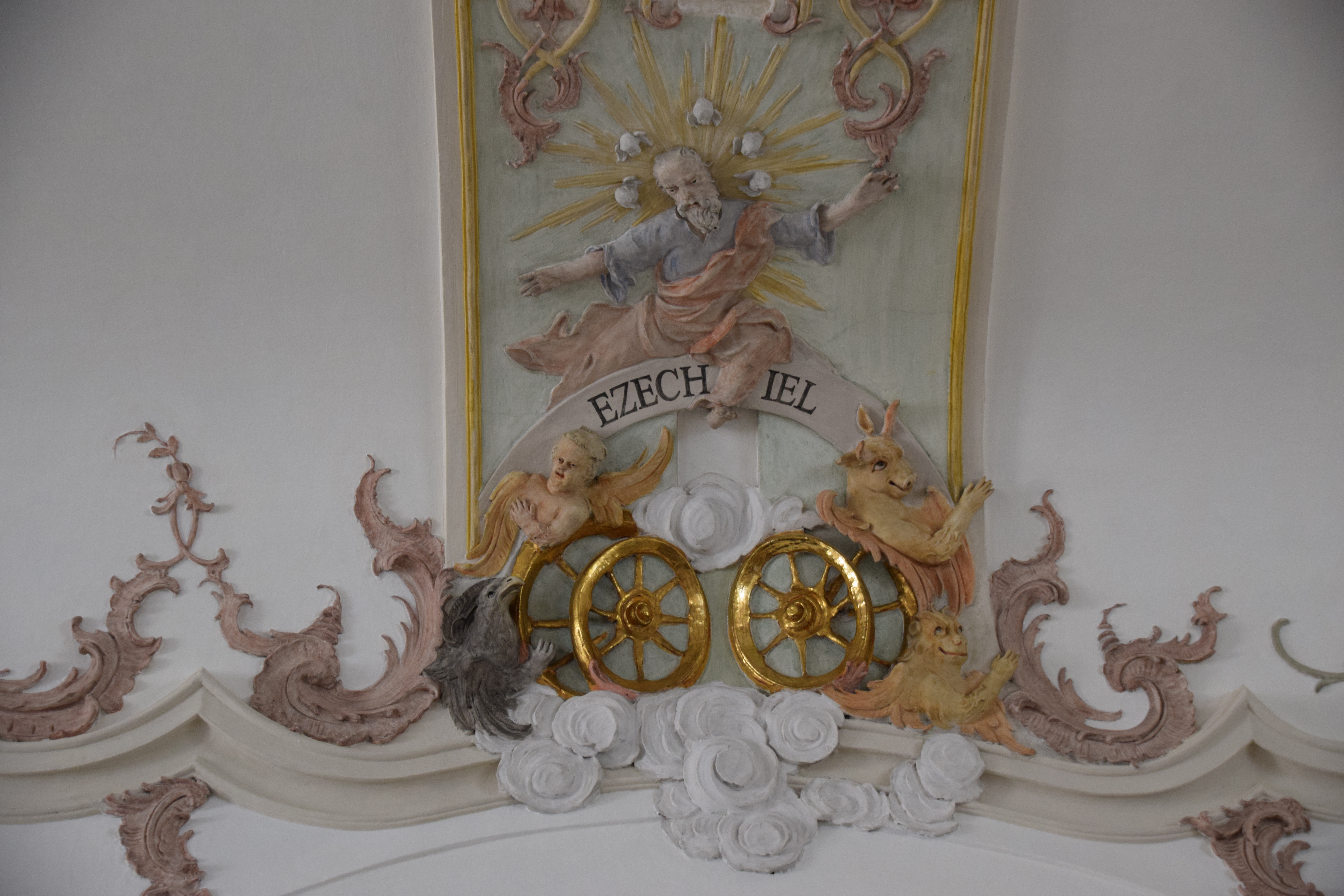 Stuckrelief des Propheten Ezechiel in der Stiftspfarrkirche St. Kassian in Regensburg